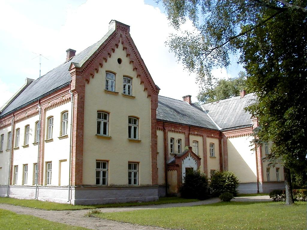 Irlavas vidusskola 2000-09-02